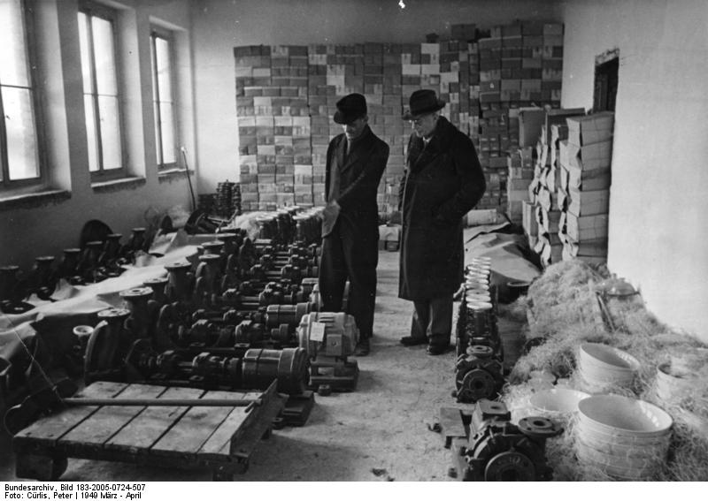 Magdeburg, VEB Fahlberg-List Magdeburg VEB Fahlberg-List Technik und Forschung in der Ostzone. Prof. [Ernst] Schmitz besichtigt Einrichtungsgegenstände seines neuen Labors. Prof. [Ernst] Schmitz leitet seit 1945 die Herstellung von Heilmitteln für Geschlechtskrankheiten bei der Firma Fahlberg-List in Magdeburg. Sein Hauptverdienst besteht in der Neuentwicklung der Salvarsanherstellung. Aufn.: Illus/Cürlis 3004-49 5.4.49 Abgebildete Personen: Schmitz, Ernst Prof. Dr.: Chemiker, Nationalpreisträger, DDR